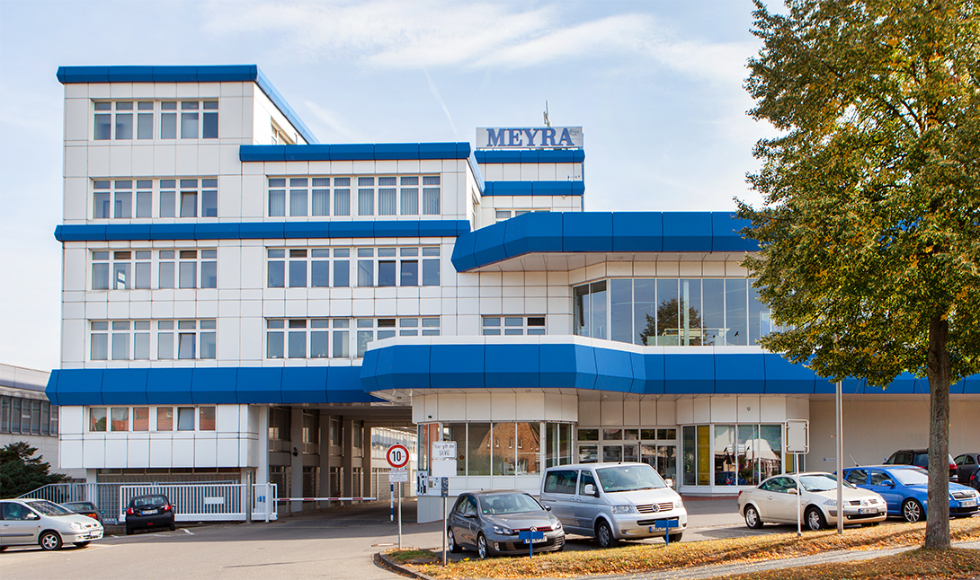 Meyra GmbH in Kalldorf (Kalletal)